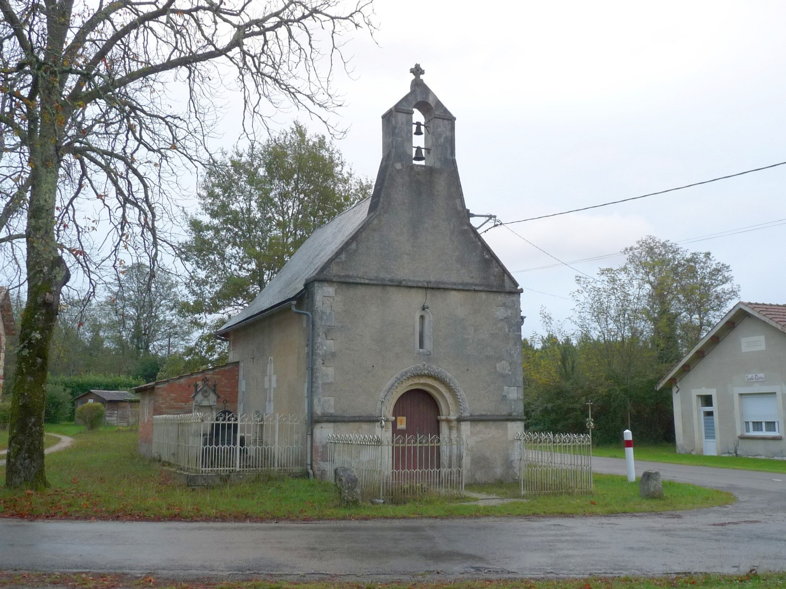 Chapelle de Croix Gente, Montendre, Charente-Maritime, France